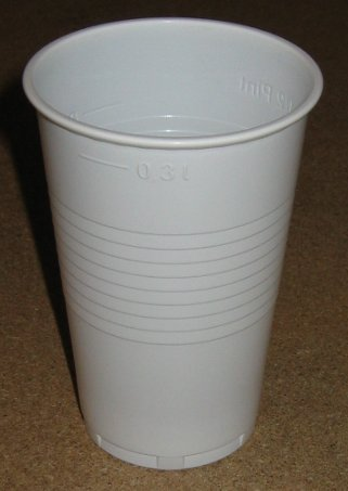 selbst fotografiert